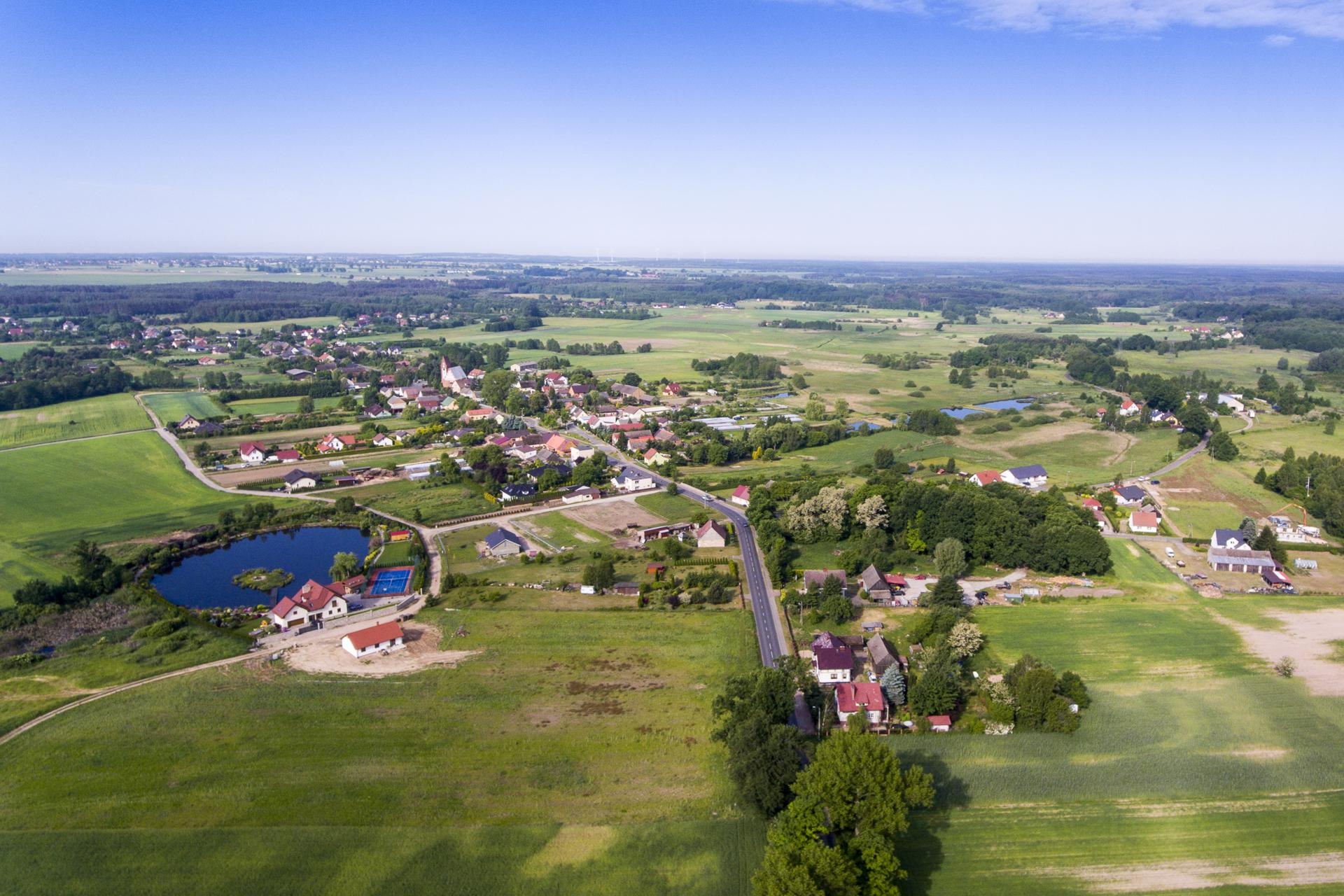 Santocko z lotu ptaka